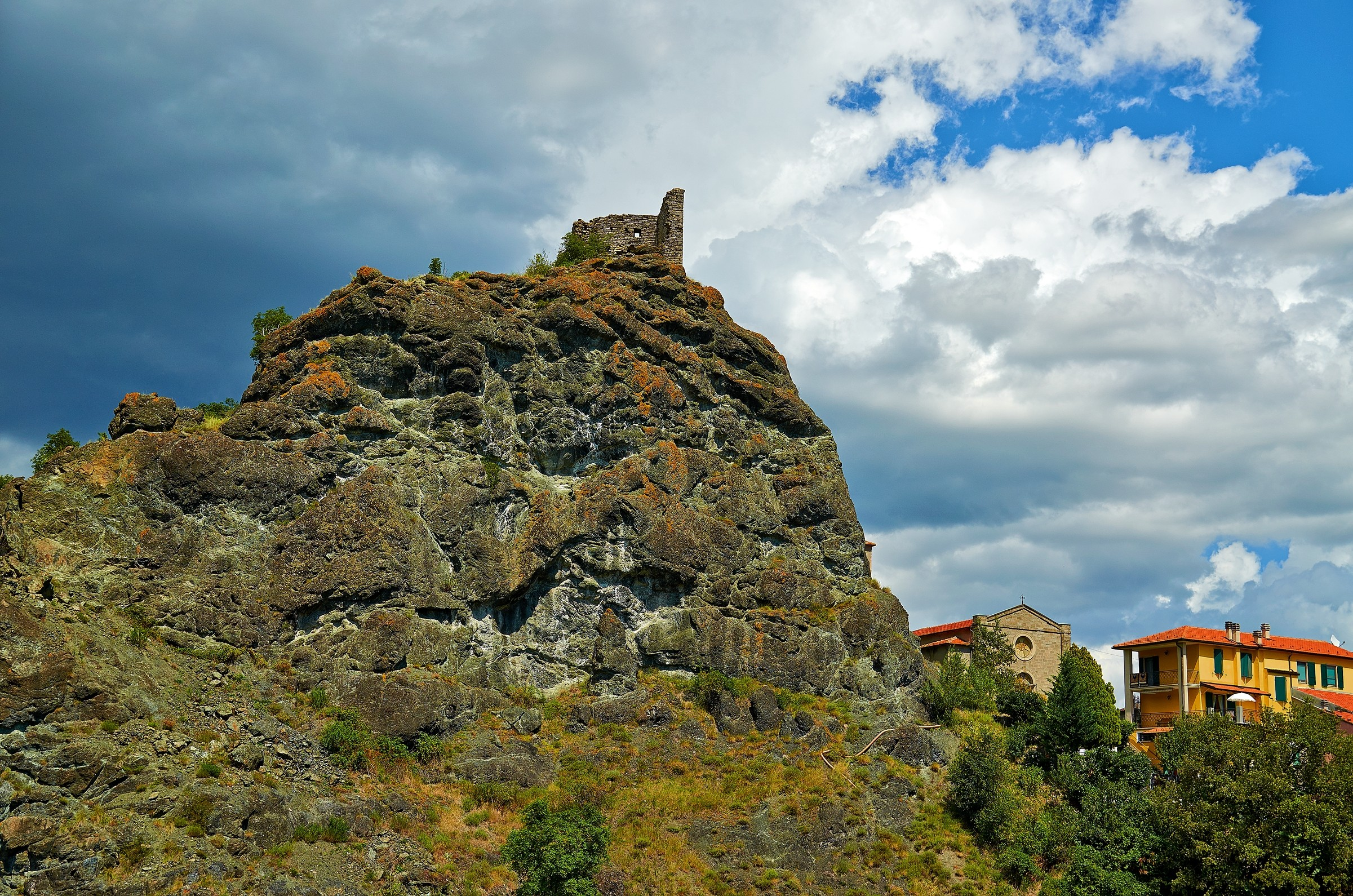 Ruderi